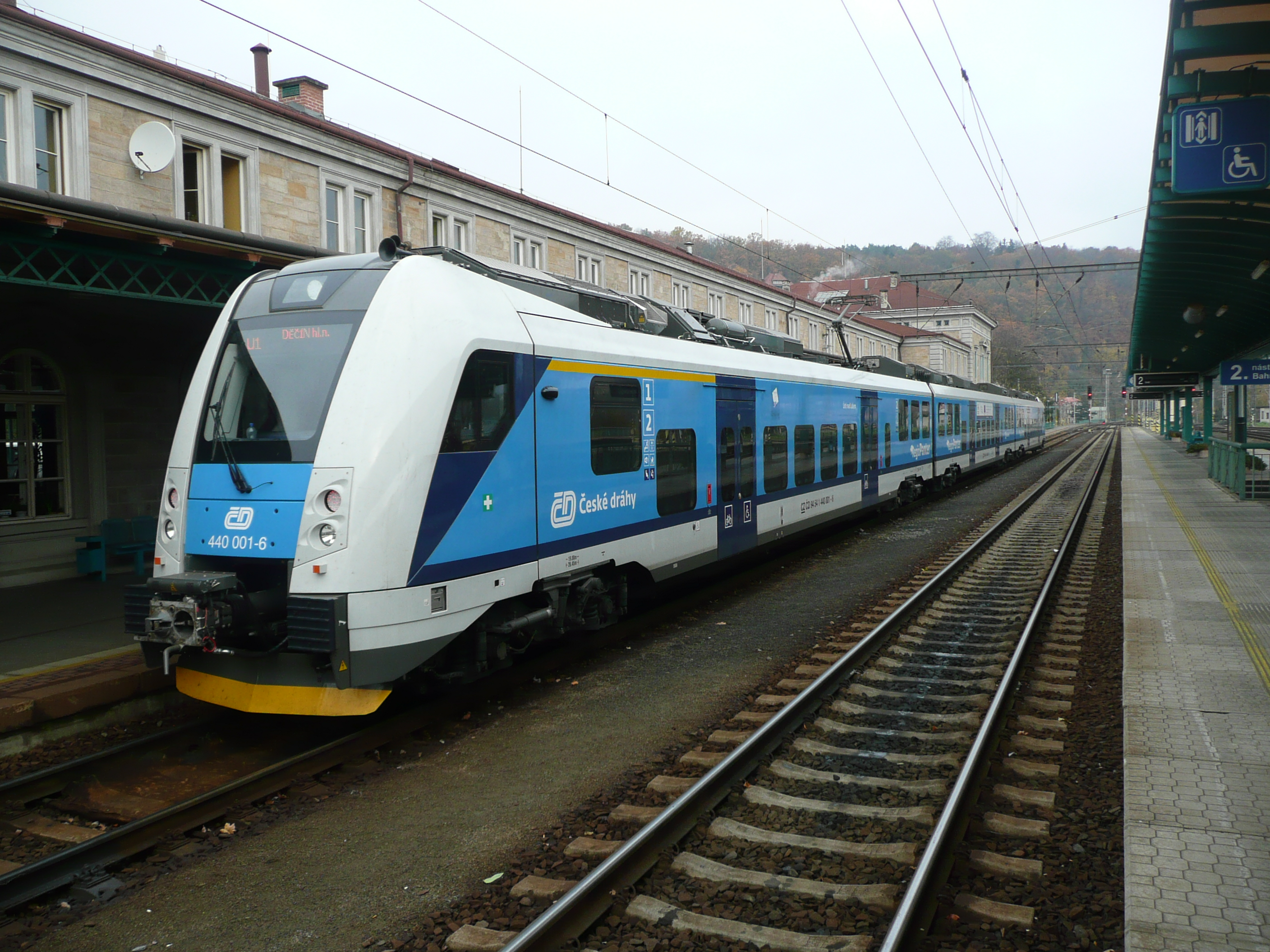 440/442/441 001 im Oktober 2012 in Decin h.l.n.